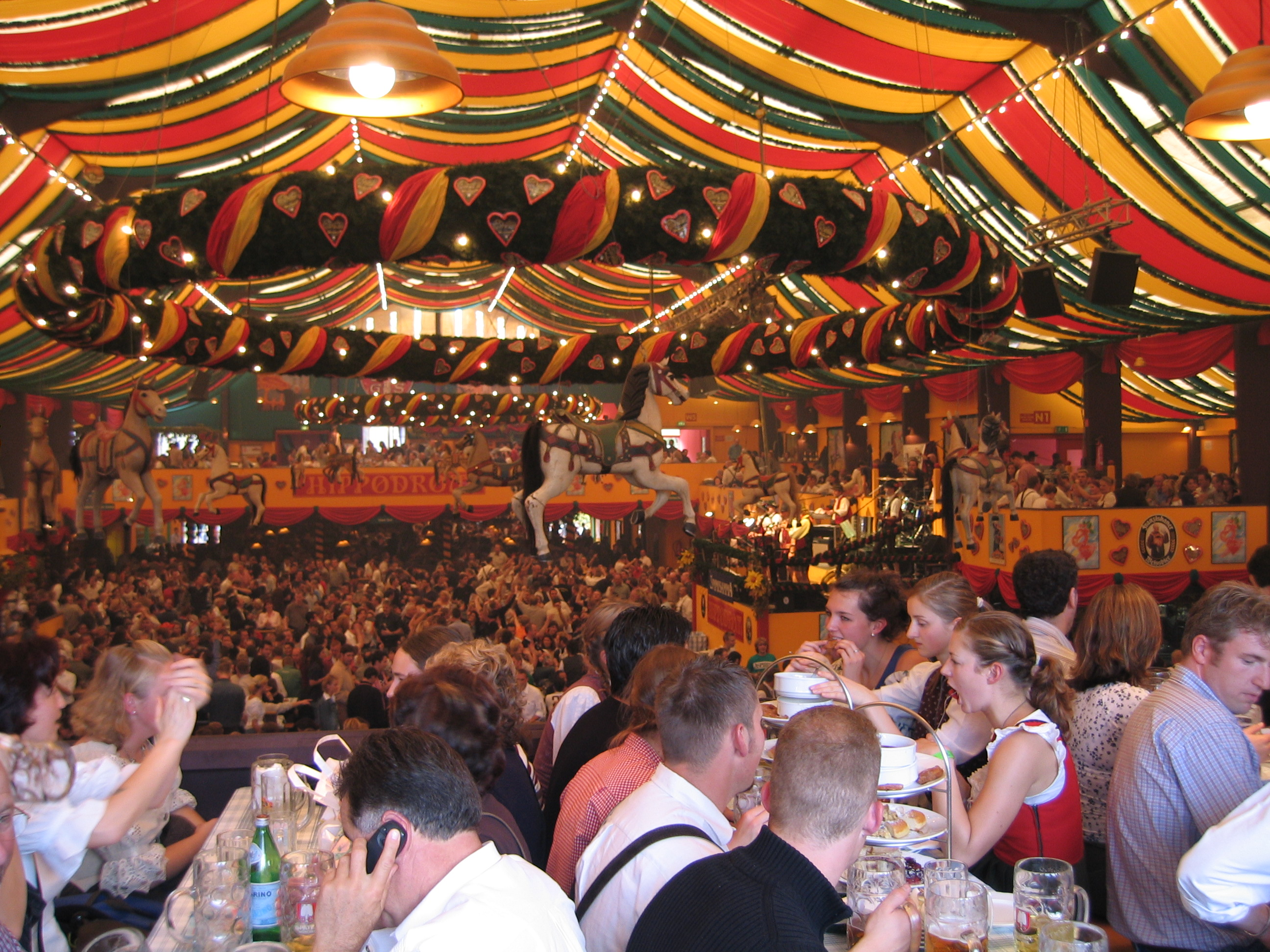 Im Hippodrom-Festzelt auf dem Oktoberfest München